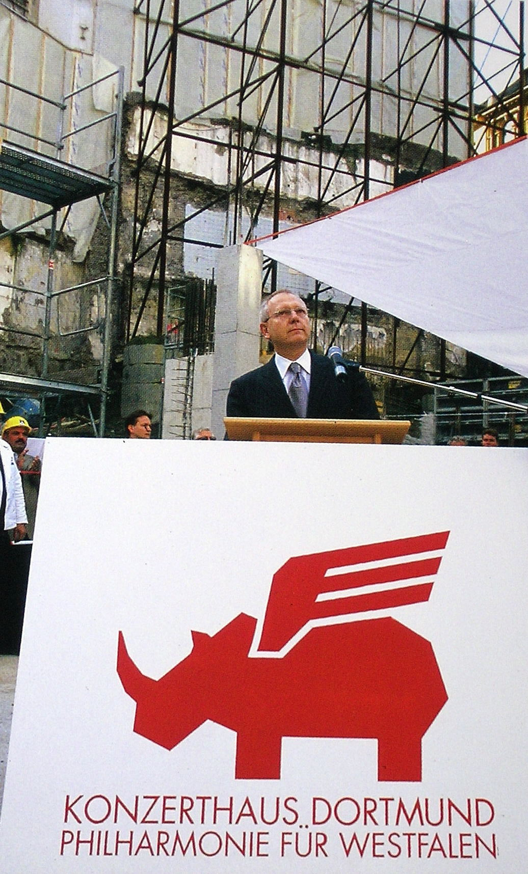 Richtfest Konzerthaus Dortmund. Das Foto habe ich im Aug. 2009 in digitale Form gebracht.